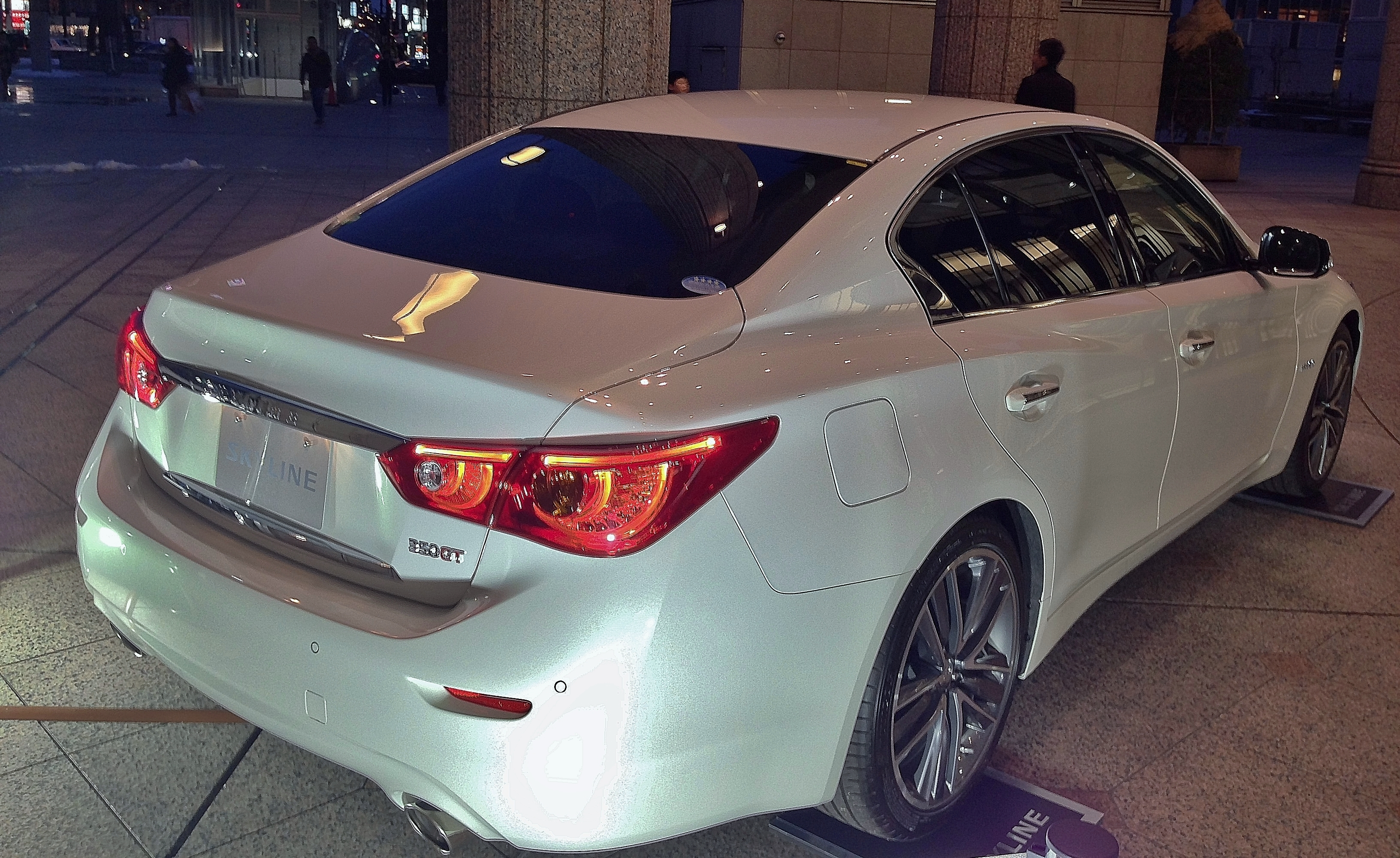 日産・DAA-HV37型スカイラインハイブリッドセダン 350GT Type SP/NISSAN SKYLINE HYBRID SEDAN 350GT Type SP(INFINITY Q50)